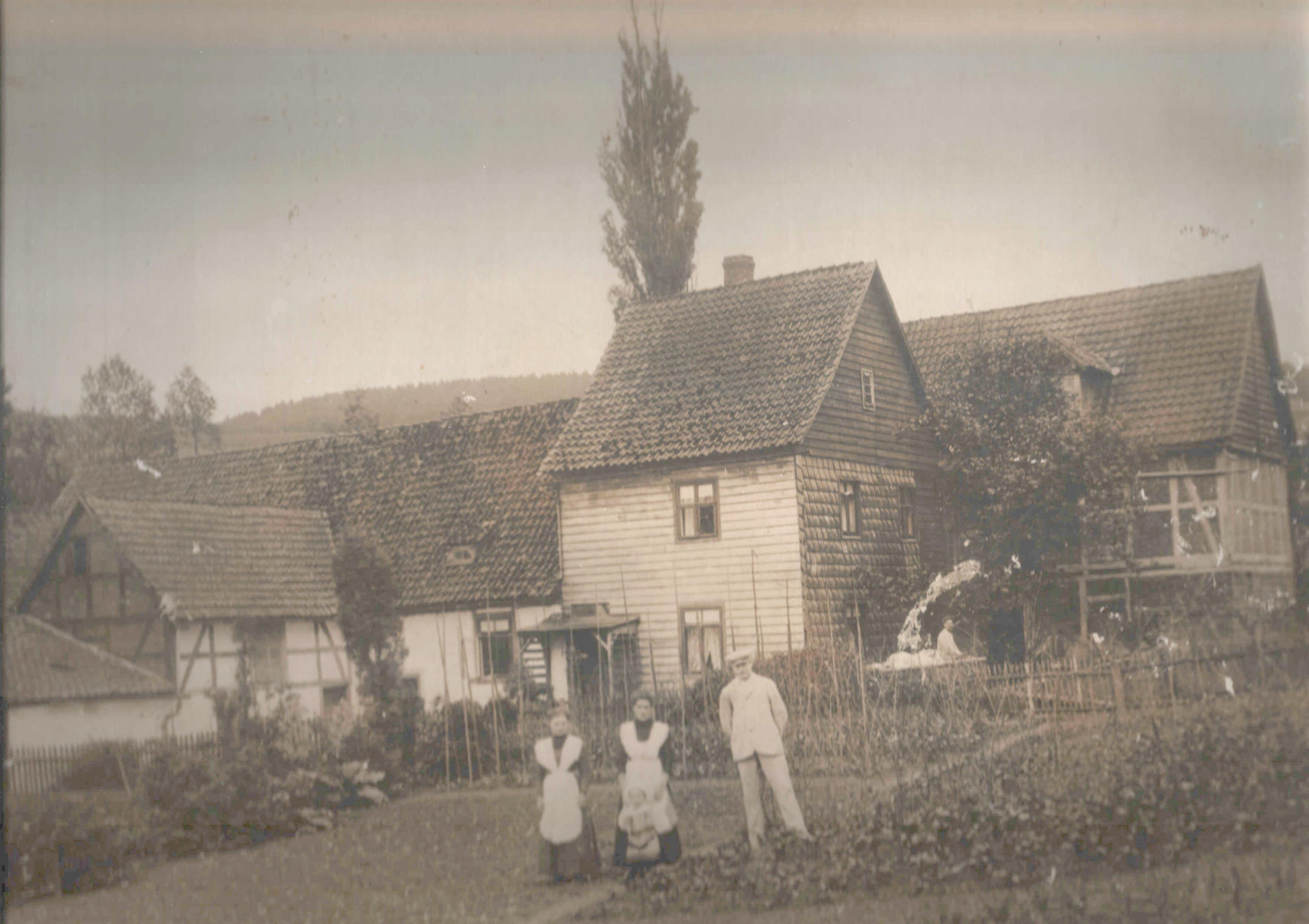 Fotografie um 1900 der Nord-Westansicht der Paradiesmühle Rischenau in Privatbesitz mit Genehmigung der Paradiesmühle Rischenau 2006